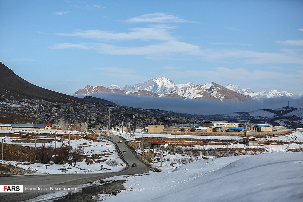 پیست اسکی فریدون‌شهر اصفهان